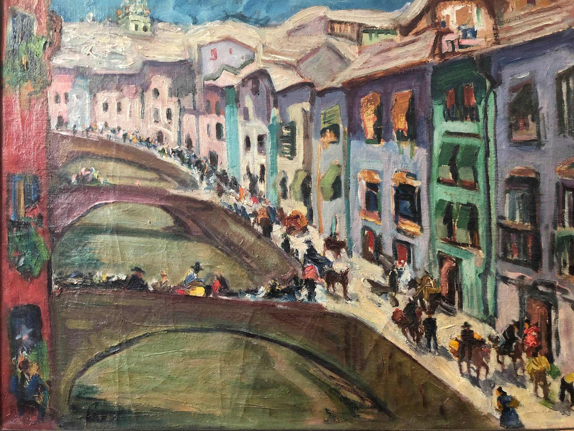 Ölgemälde des deutschen Malers Paul Paeschke (1875 - 1943), Straße am Rio Darro in Granada